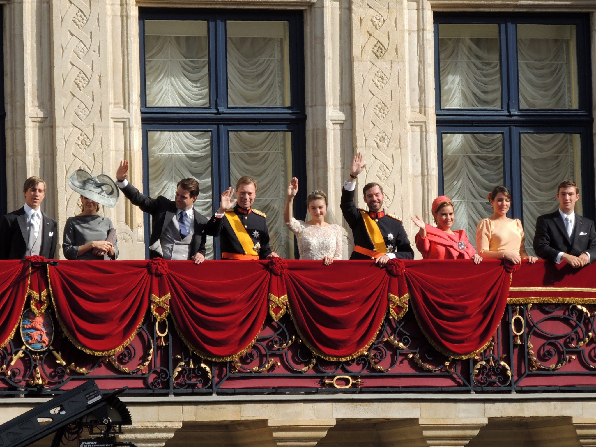 Nom Bestietnes vum Ierfgroussherzog Guillaume mat der Stéphanie vu Lëtzebuerg hëlt d'groussherzoglech Famill d'Akklamatioune vun de Volleksmassen um Balkon vum Palais entgeint.